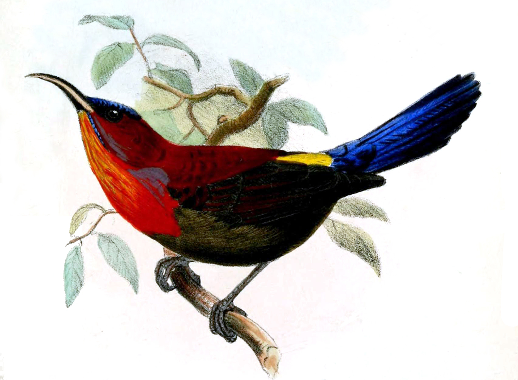 Aethopyga siparaja flavostriata (Wallace, 1865), ♂